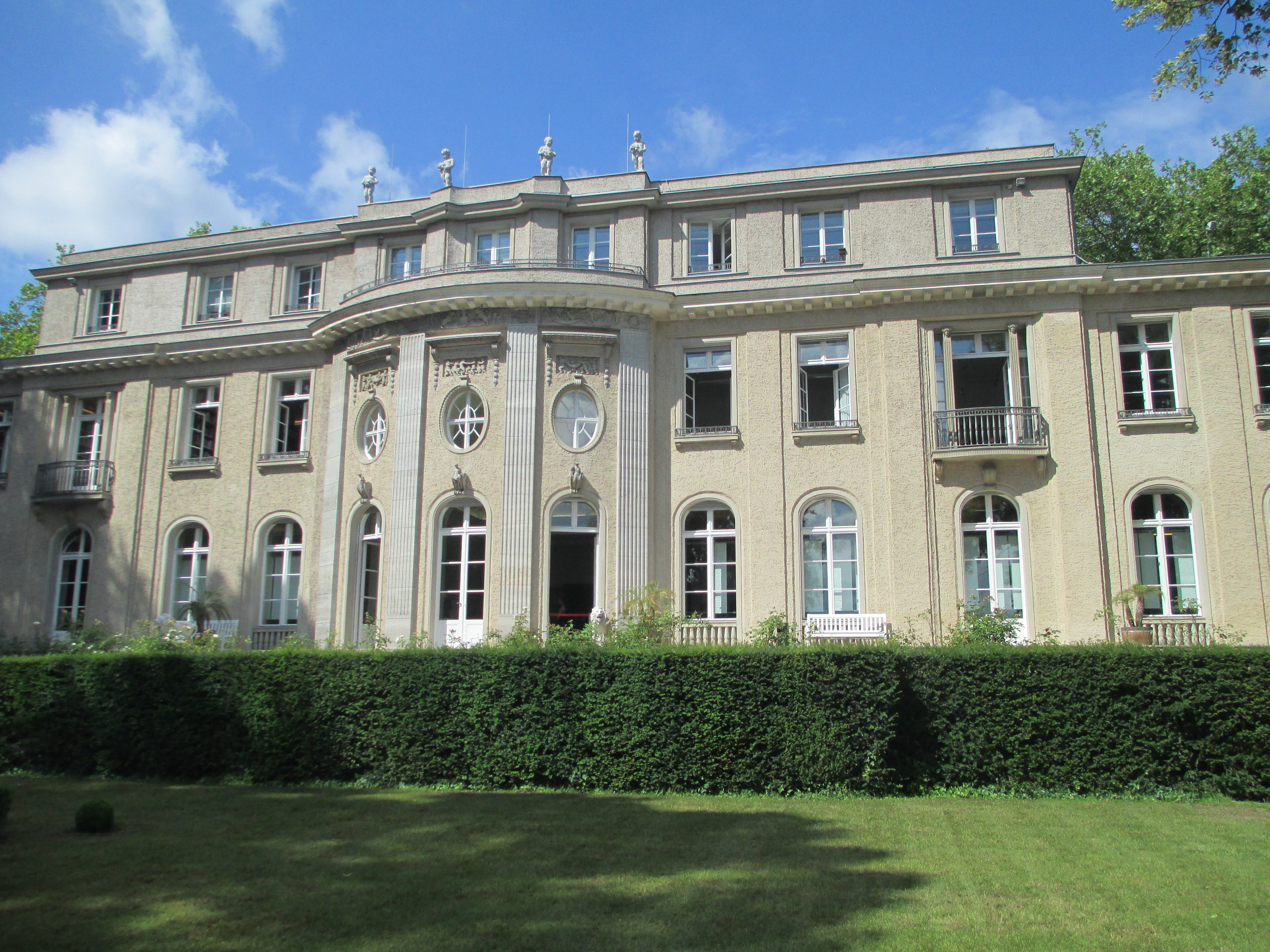 החזית האחורית של וילה ואנזה